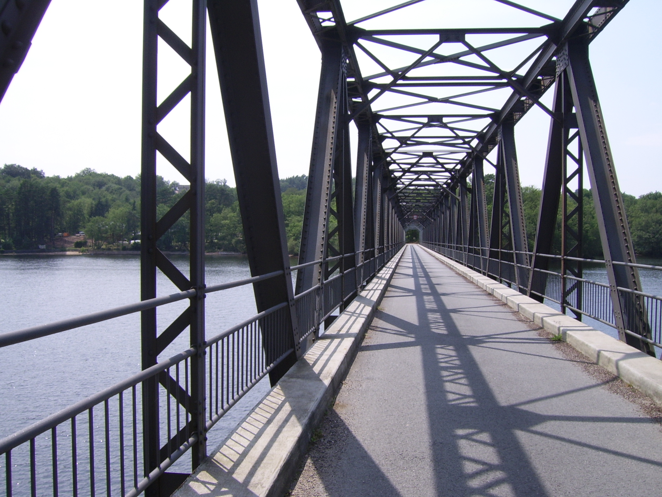 Viaduc de Lantourne, près de Marcillac-la-Croisille (19, Fr) Photo prise en juillet 2006